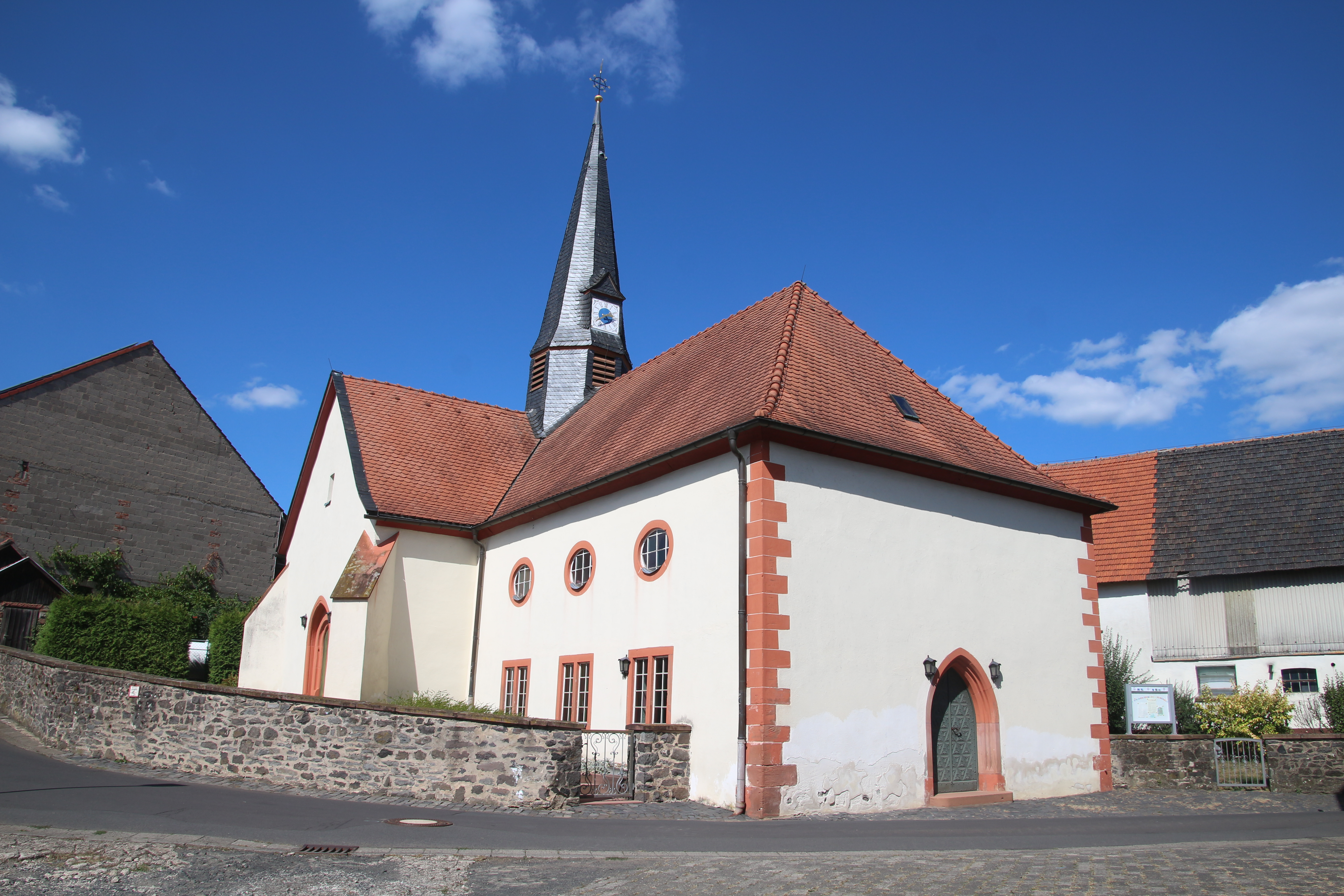 Evangelische Kirche Fauerbach, Gemeinde Nidda, Wetteraukreis, Hessen